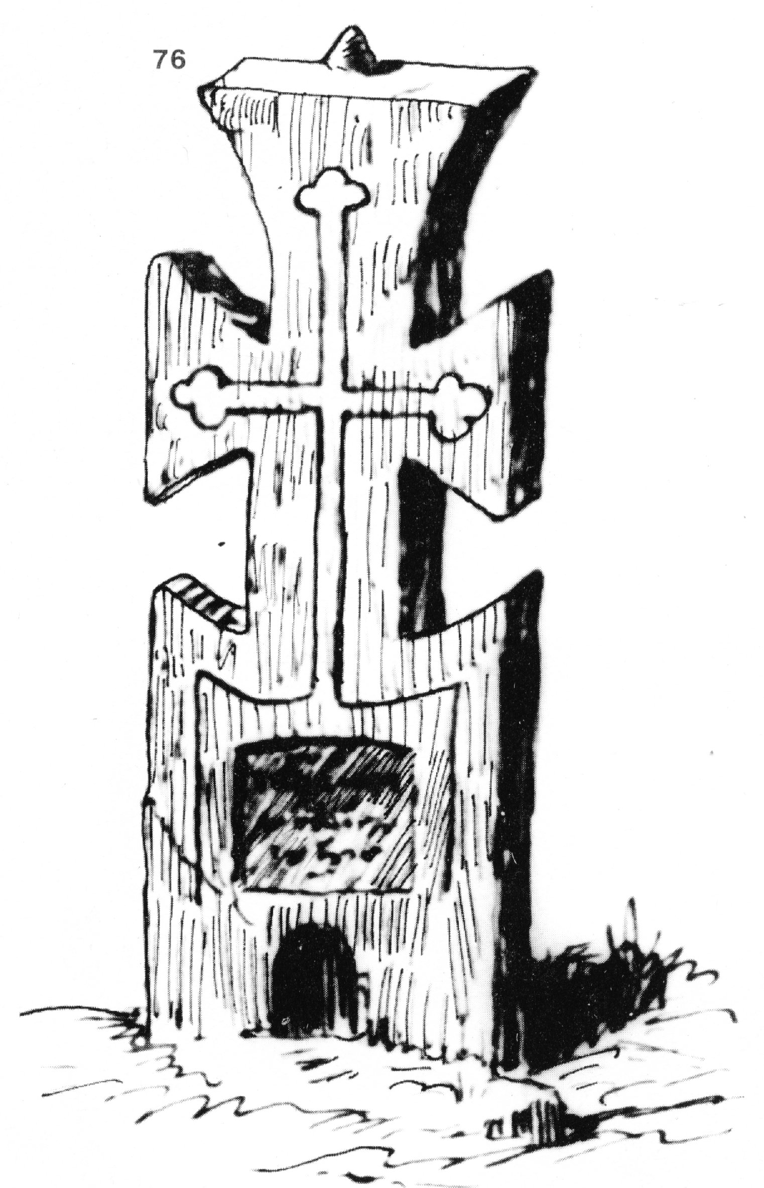 76. Кръст - надгробен паметник, из гробищата на с. Роман, Врачанско. Издялан през 1880 г. От сив точилен камък. Четирикрилен; горните му крила са трапе­цовидни, разширяващи се с дъги навън; долното е четвъртито, базира на голяма четвъртита подставка, върху лицето на която е издълбана плитка ниша с надпис, а под нея малка сводеста ниша за кандило. По лицето на кръста е гравиран четирикрилен кръст. Най-горното крило на паметника носи конусовидна ябълка с 4 см в диаметър. Размери: 84x31x9 см. Скициран на 20.VII.1916 г. (т. 8, обр. 81.)